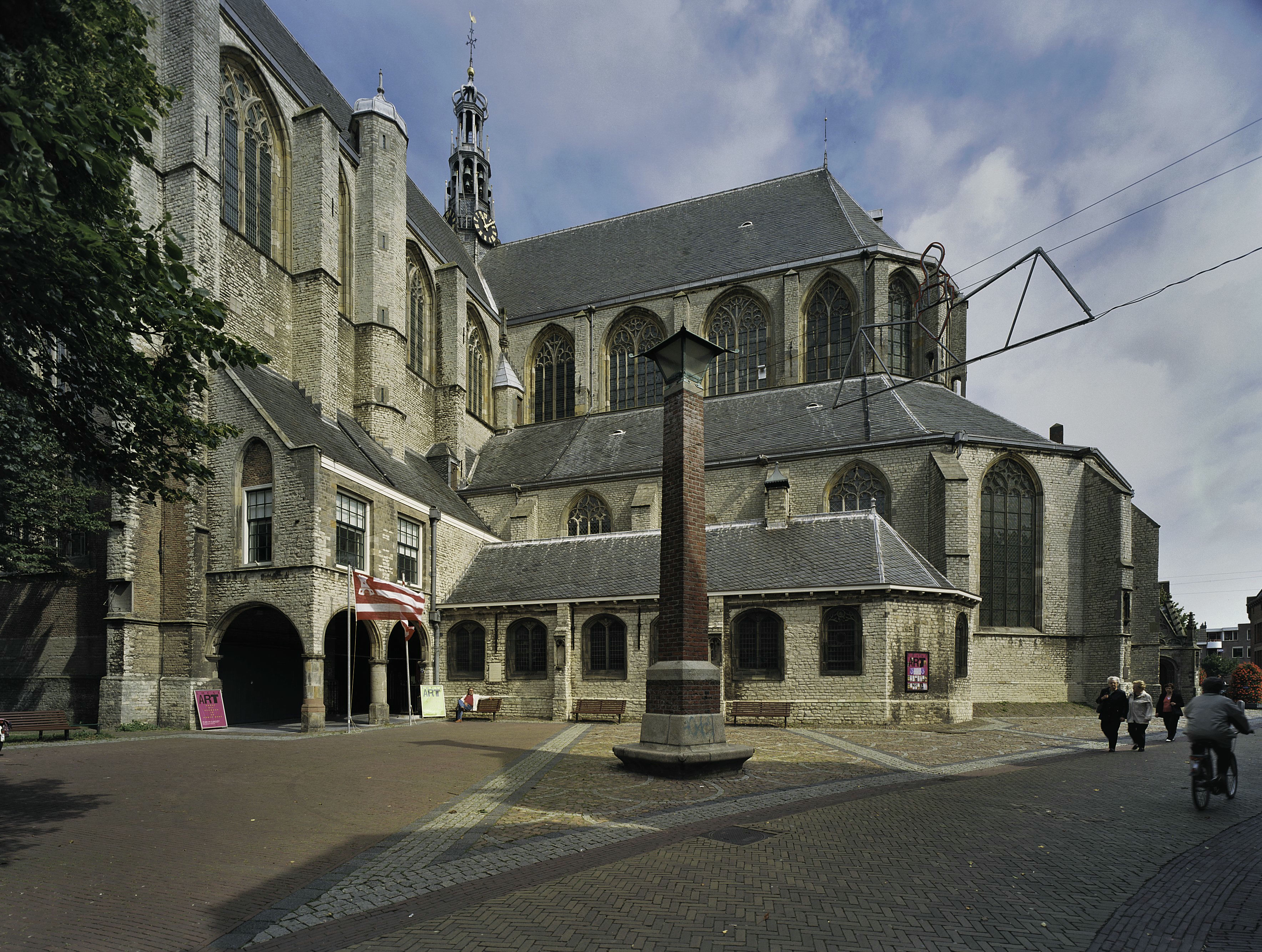 Grote- of Sint Laurenskerk: Overzicht zuidoostgevel met koor en straatlantaarn (opmerking: Boek: "66 Kanjermonumenten")